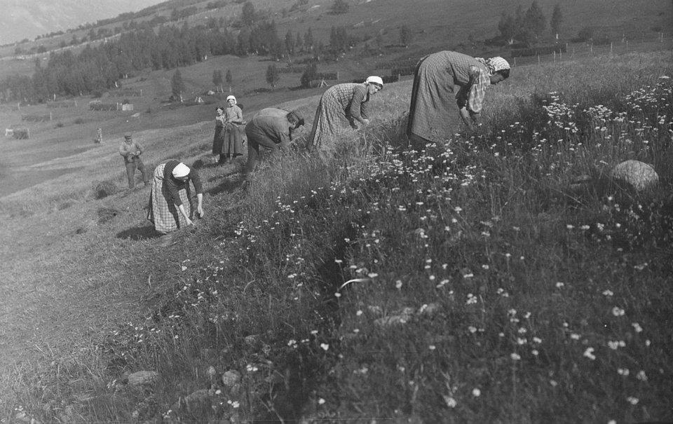 Bildet er hentet fra Arkivverket. Reinbeitekommisjonen av 1913 har etterlatt seg et bra arkiv. Det inneholder også fotografier fra Troms. Mye er landskap, men noen hundre av fotografiene viser også mennesker, bygninger og båter. Tre fotografier viser innhøsting av korn på Ytre Tomasjord i Balsfjord, stedfestet til Edvard Hansens gård, gnr. 11 bnr. 1 i Balsfjord. Litt korndyrking var tidligere vanlig også så langt nord, og det ser vi dokumentert her. I tillegg ser vi den tradisjonelle innhøstingsmåten for korn: skjæring for hånd, med sigd. Reinbeitekommisjonen fotograferte for sitt dokumentasjonsformål og noen av fotografiene er brukt i kommisjonens trykte rapporter. Men særlig blant de som ikke ble brukt av kommisjonen, kan det være mye informasjon å hente. Arkivinstitusjon : Riksarkivet Arkivnavn : Reinbeitekommisjonen av 1913 Sted : Norge, Troms, Balsfjord, Emneord: Formidlingsarbeid Avbildet